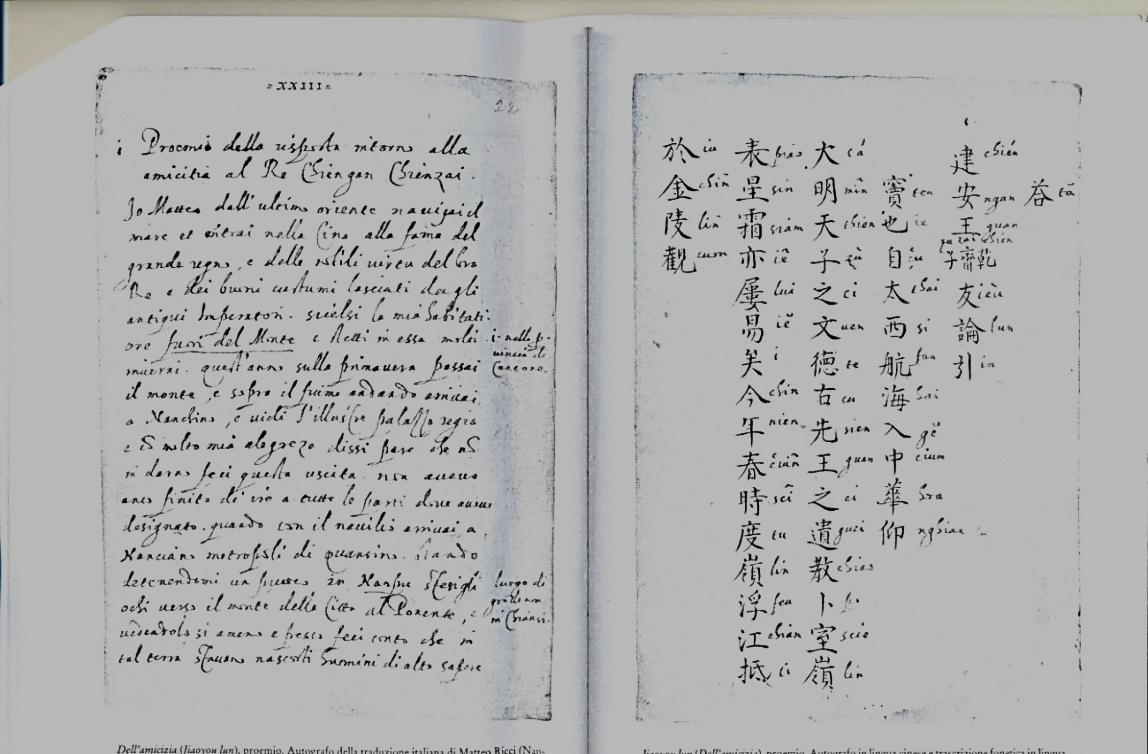 Cópia de um trecho do Tratado sobre a Amizade na qual observa-se uma página em italiano (à esquerda) e a transliteração sonora dos ideogramas chineses (à direita).